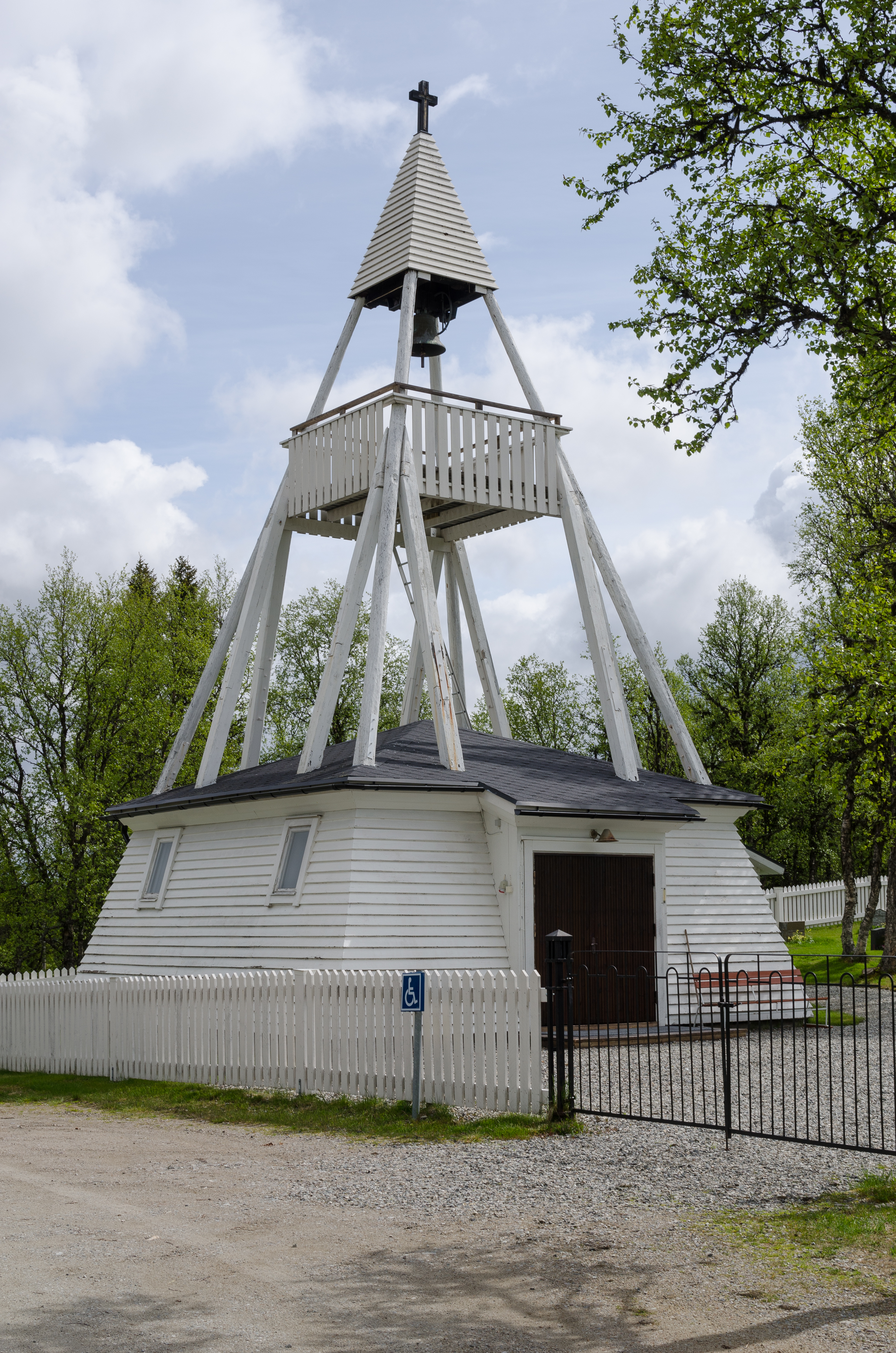 Högvålen chapel (swedish: Högvålens kapell), Högvålen, Härjedalen Municipality, Jämtland County, Seden. Högvålen chapel (swedish: Högvålens kapell), Högvålen, Härjedalen Municipality, Jämtland County, Sweden. At 835 metres (2738 feet) above sea level, Högvålen is Sweden's highest continuously inhabited village.